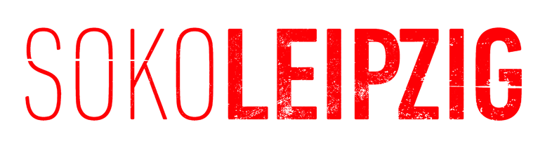 Logo der ZDF-Krimiserie SOKO Leipzig